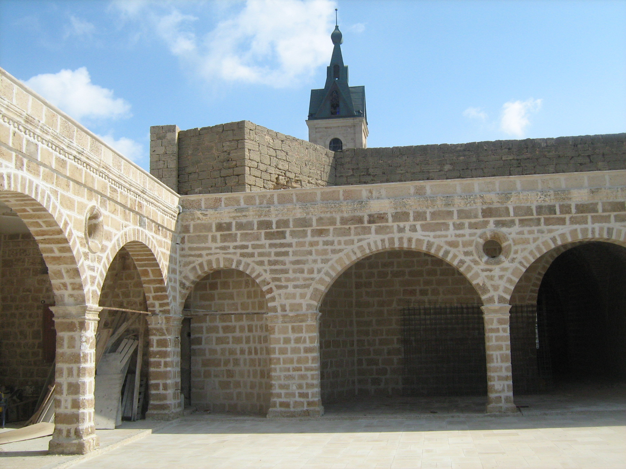 מסגד מחמודיה ביפו